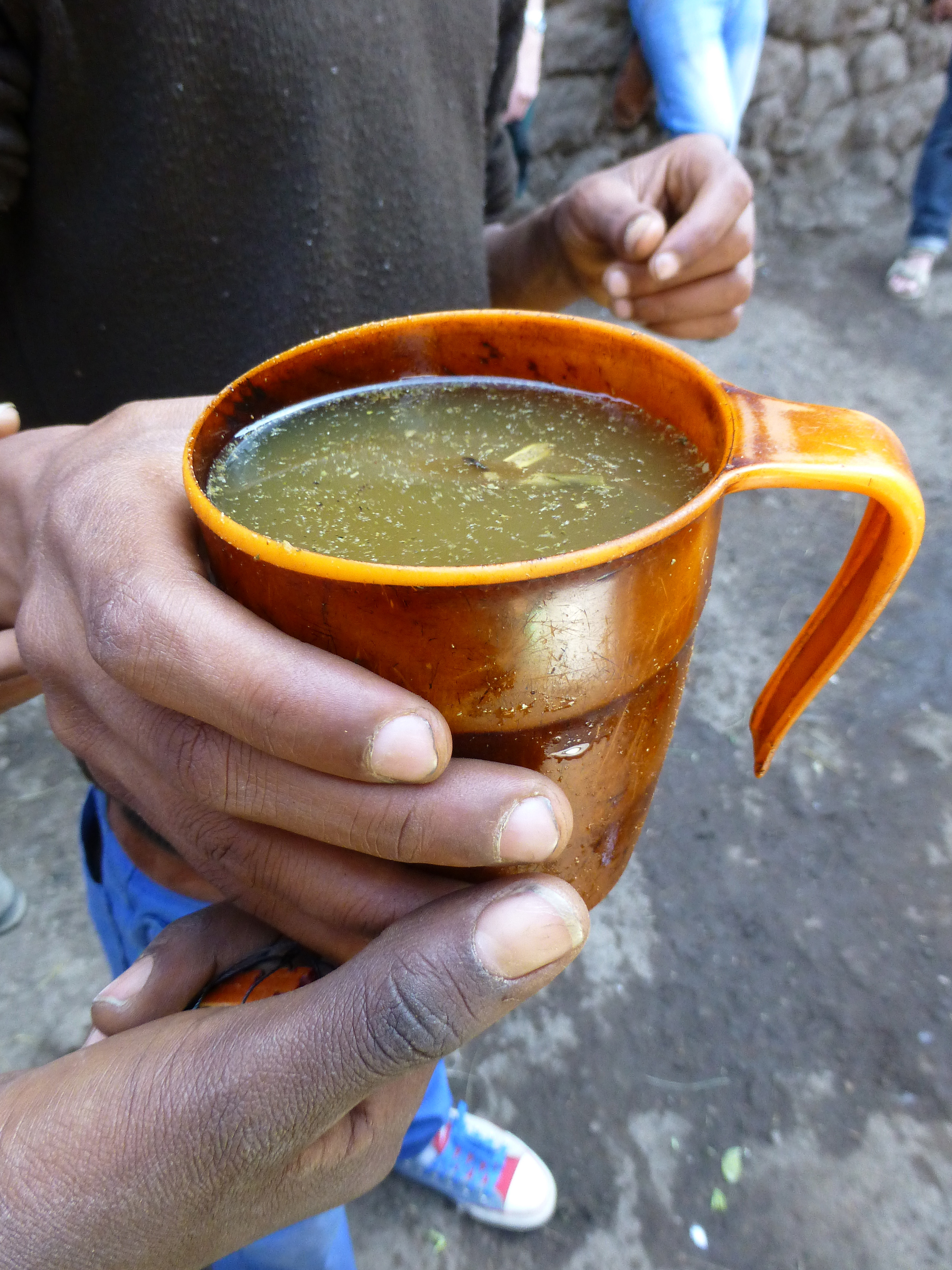 Ethiopie (Lalibela) : tella, bière traditionnelle